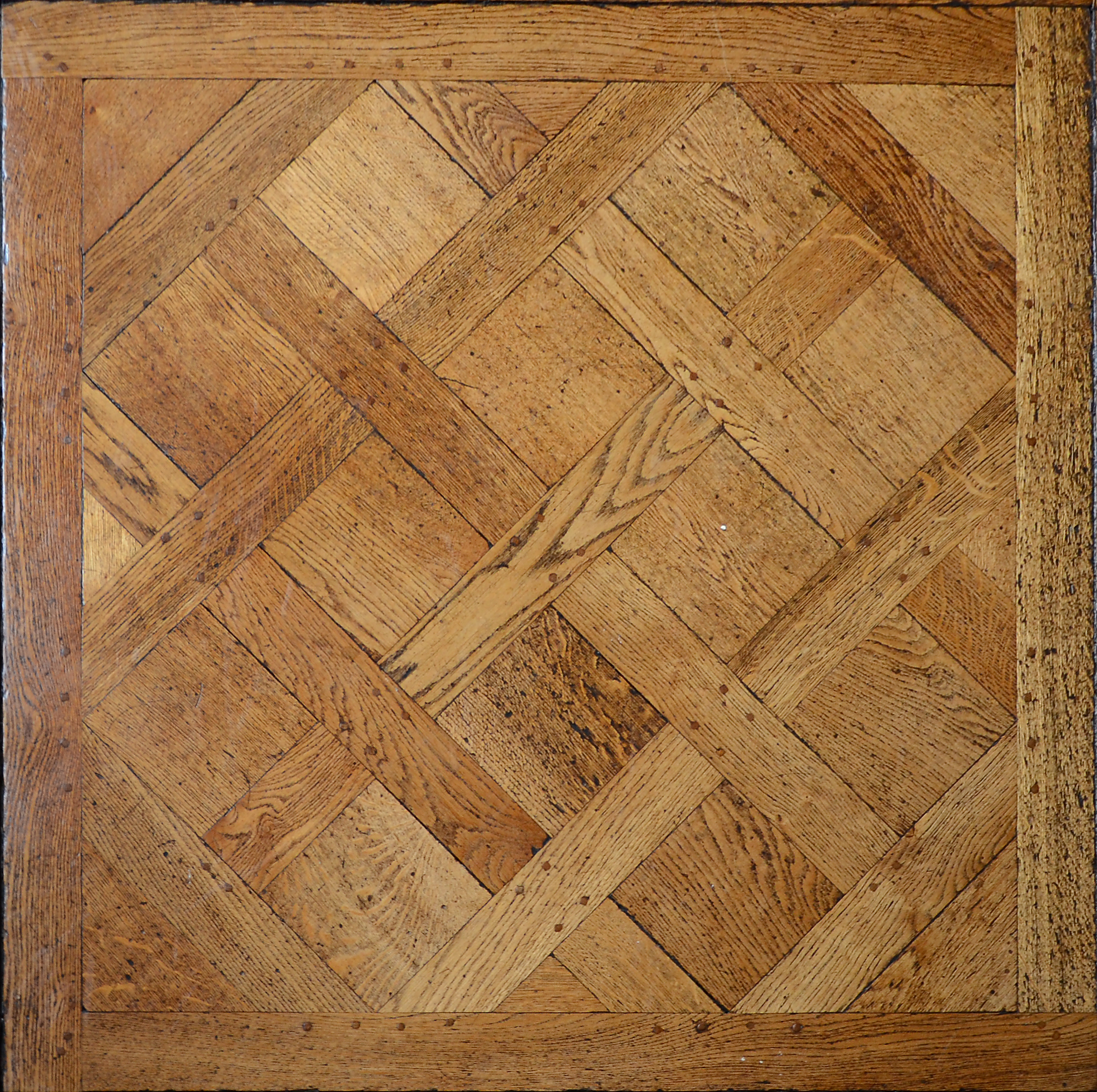 Parquet flooring photographed in the Musée des arts décoratifs de Strasbourg